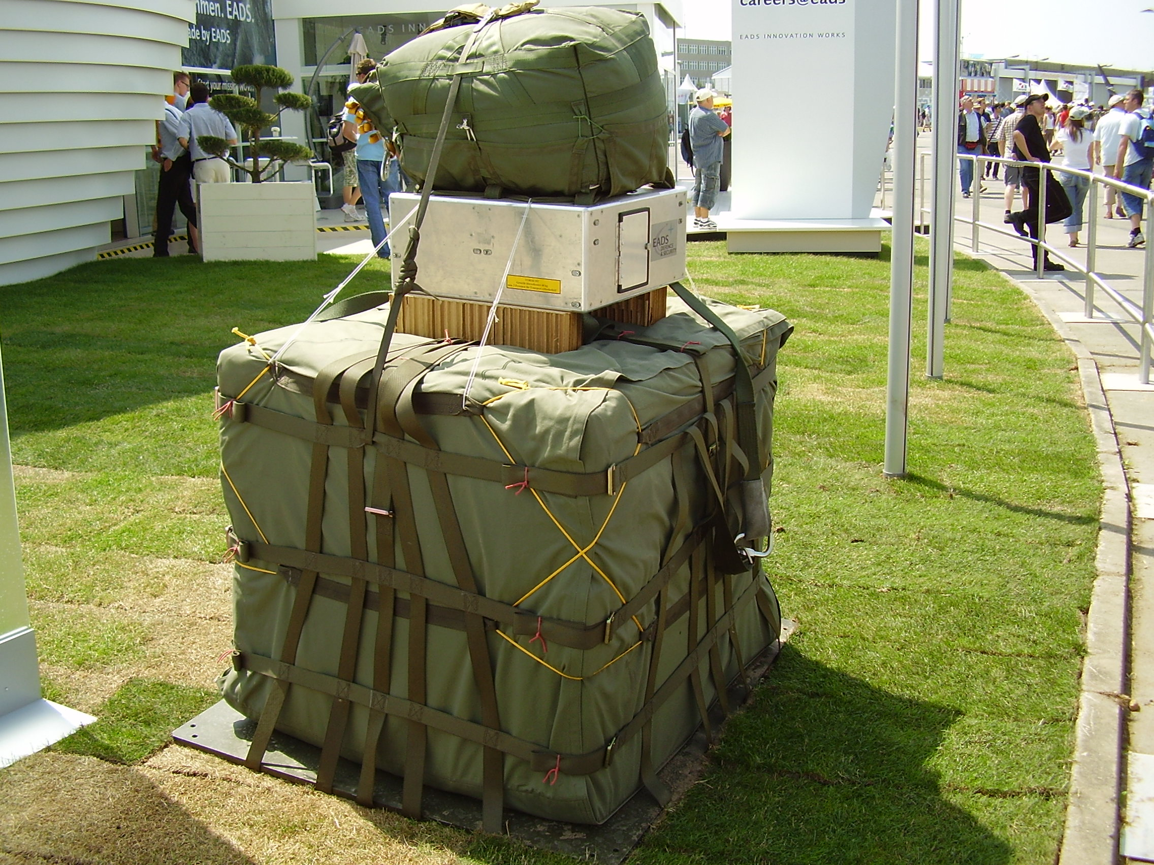 ILA 2008; Paralander; Präzisionsluftlandesystem; EN: Precision Airdrop System; EADS